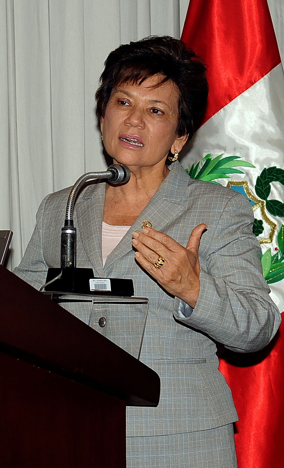 La segunda vicepresidenta del Congreso, Alda Lazo (AN), en la clausura del foro “La inseguridad ciudadana y sus implicancias en los costos de las empresas” señaló la necesidad de tener una estrategia y una respuesta conjunta frente a la inseguridad.